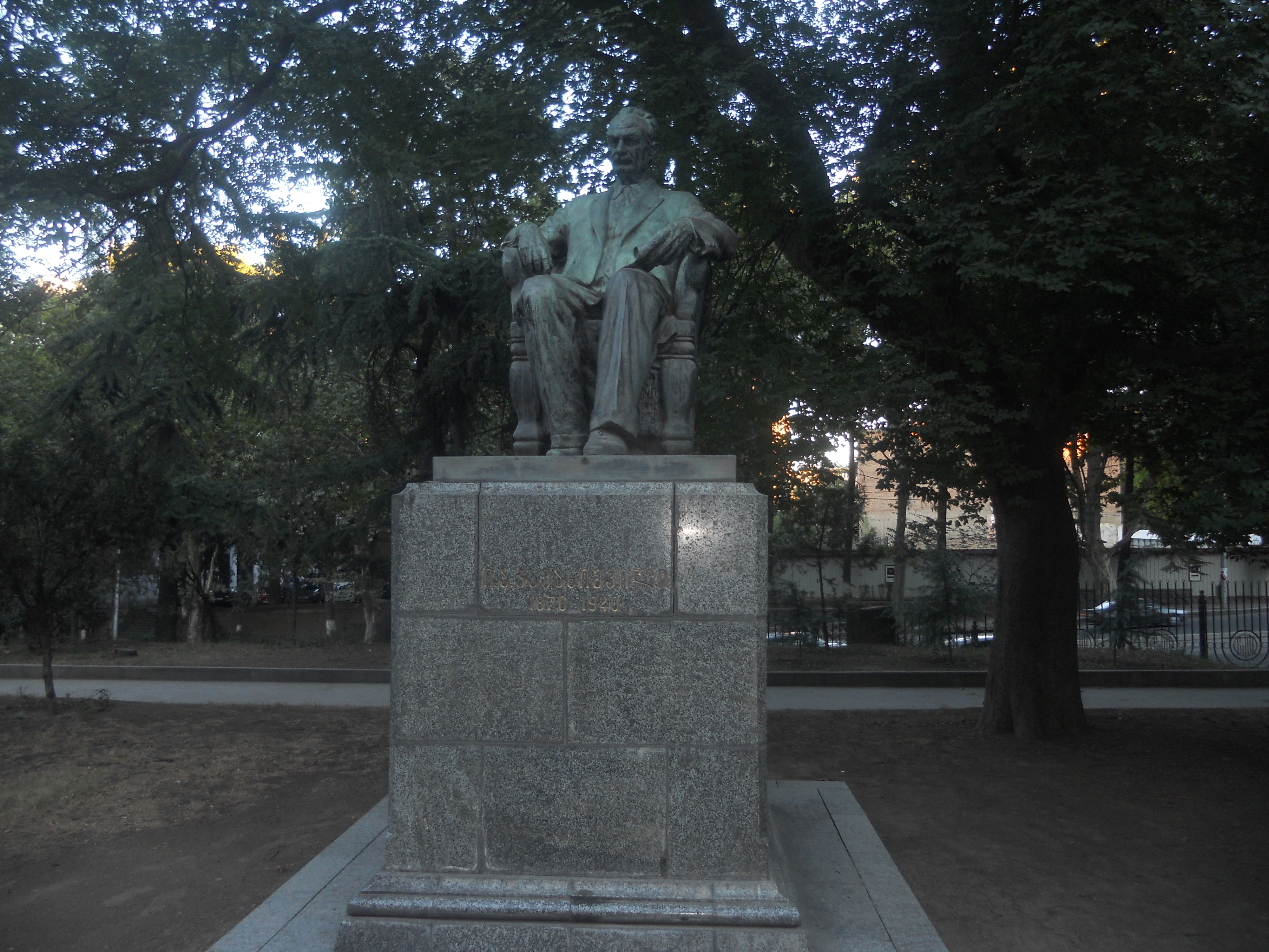 სახელმწიფო უნივერსიტეტის I კორპუსი